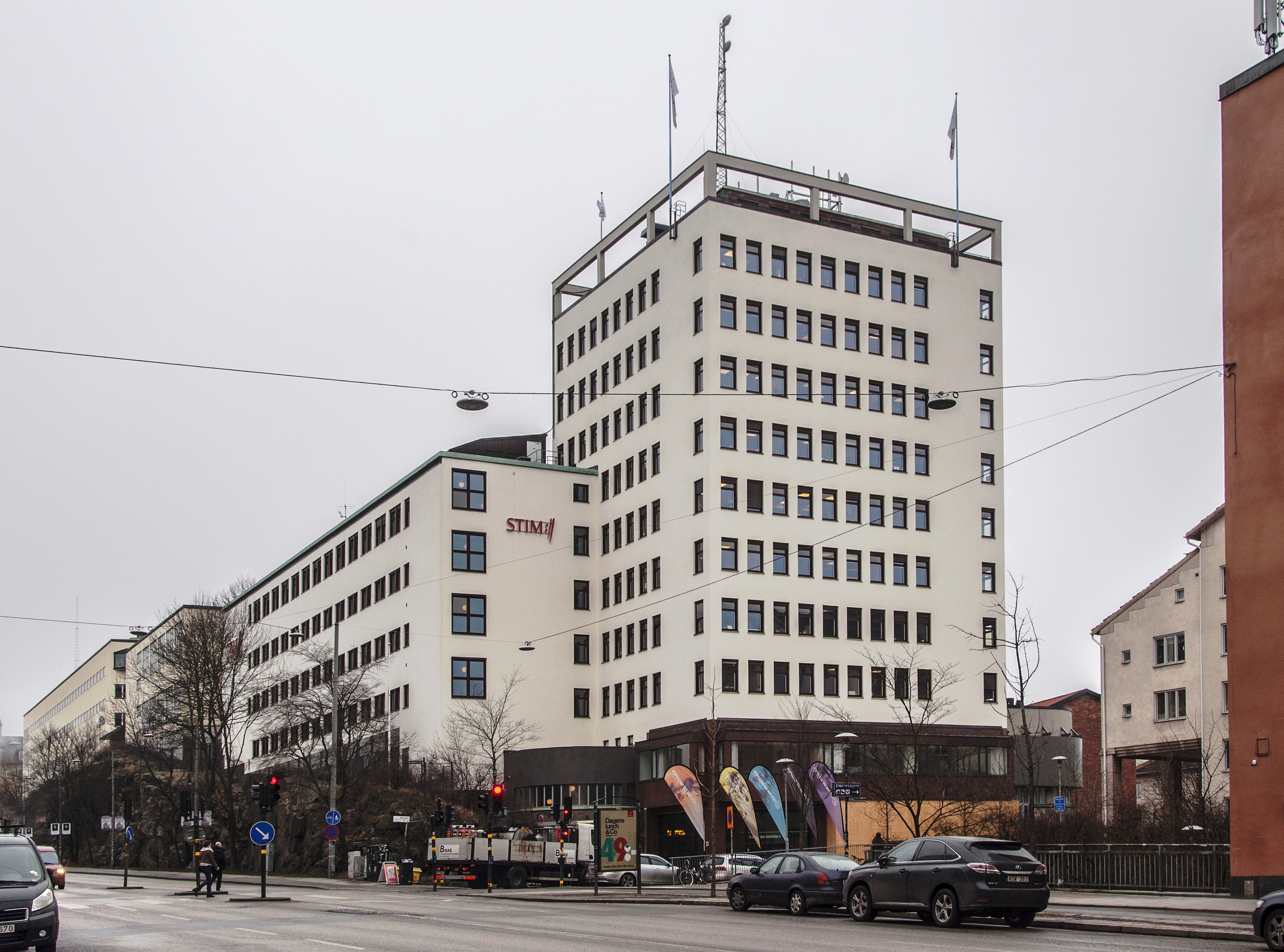 f.d. Teleskolan, kv. Krukomakaren 17, Hornsgatan 103, Stockholm, Nybyggnadsår 1947, Byggnadsstyrelsen (Byggherre) Hans Brunnberg (Arkitekt) Hans Neumüller(Arkitekt) Kungliga Telegrafstyrelsen (Byggherre)